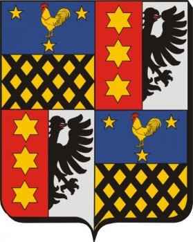 Kleurrijke weergave van het familiewapen Bierens de Haan